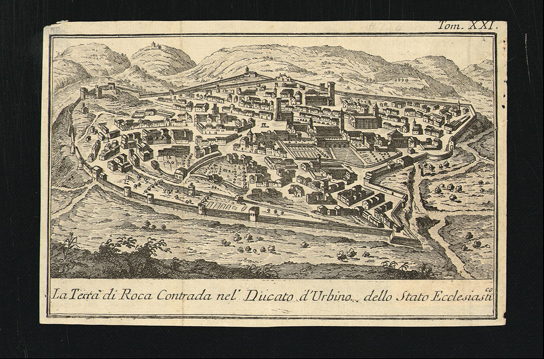 La Terra di Roca Contrada nel Ducato d'Urbino dello Stato Ecclesiastico. Venezia: Salmon, 1757. Incisione all'acquaforte su rame, stampa con margini quasi a filo, 104x158 f., 97x151 s. Recto e verso.